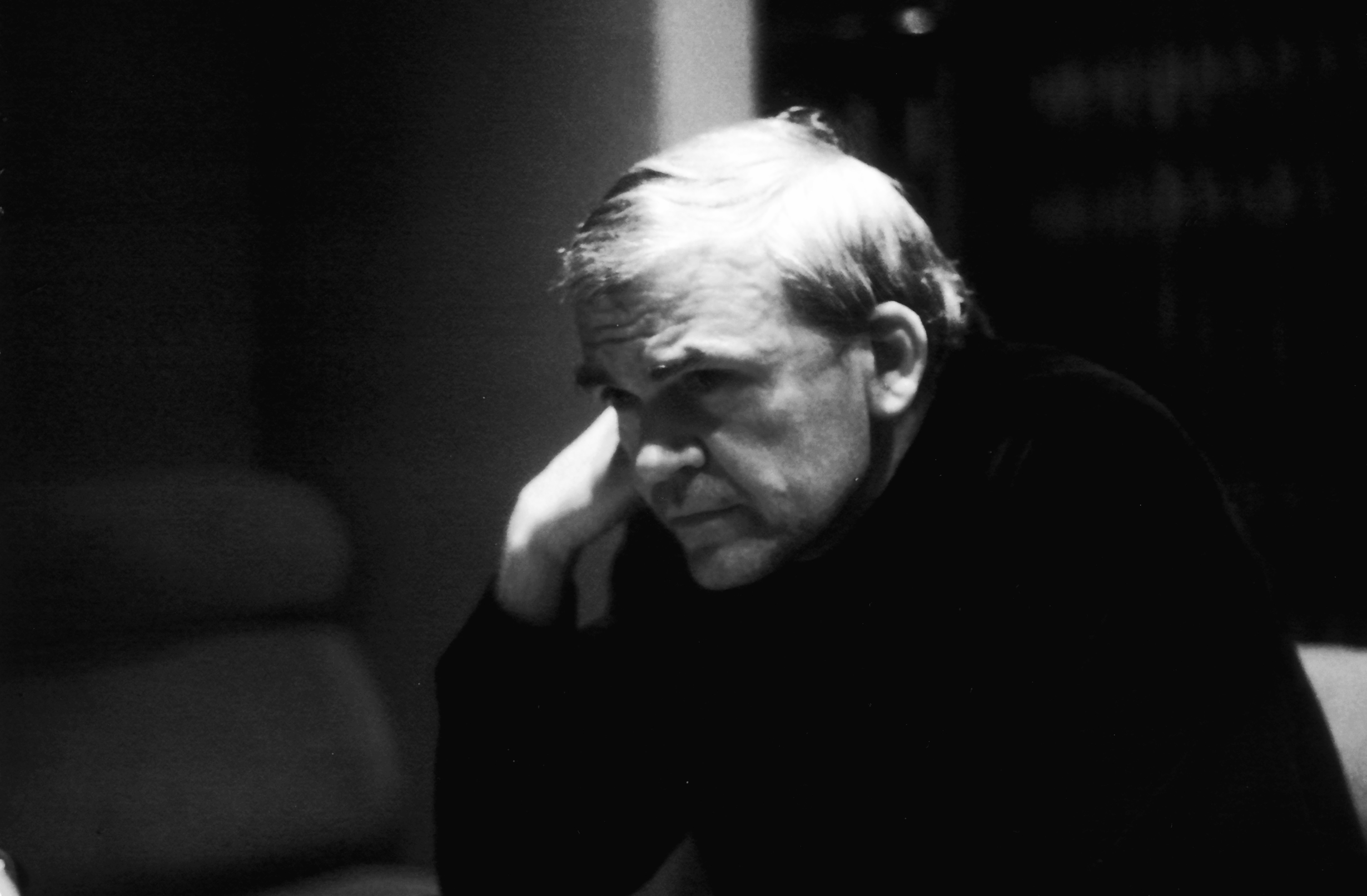 Milan Kundera en 1980, escritor y disidente checo.